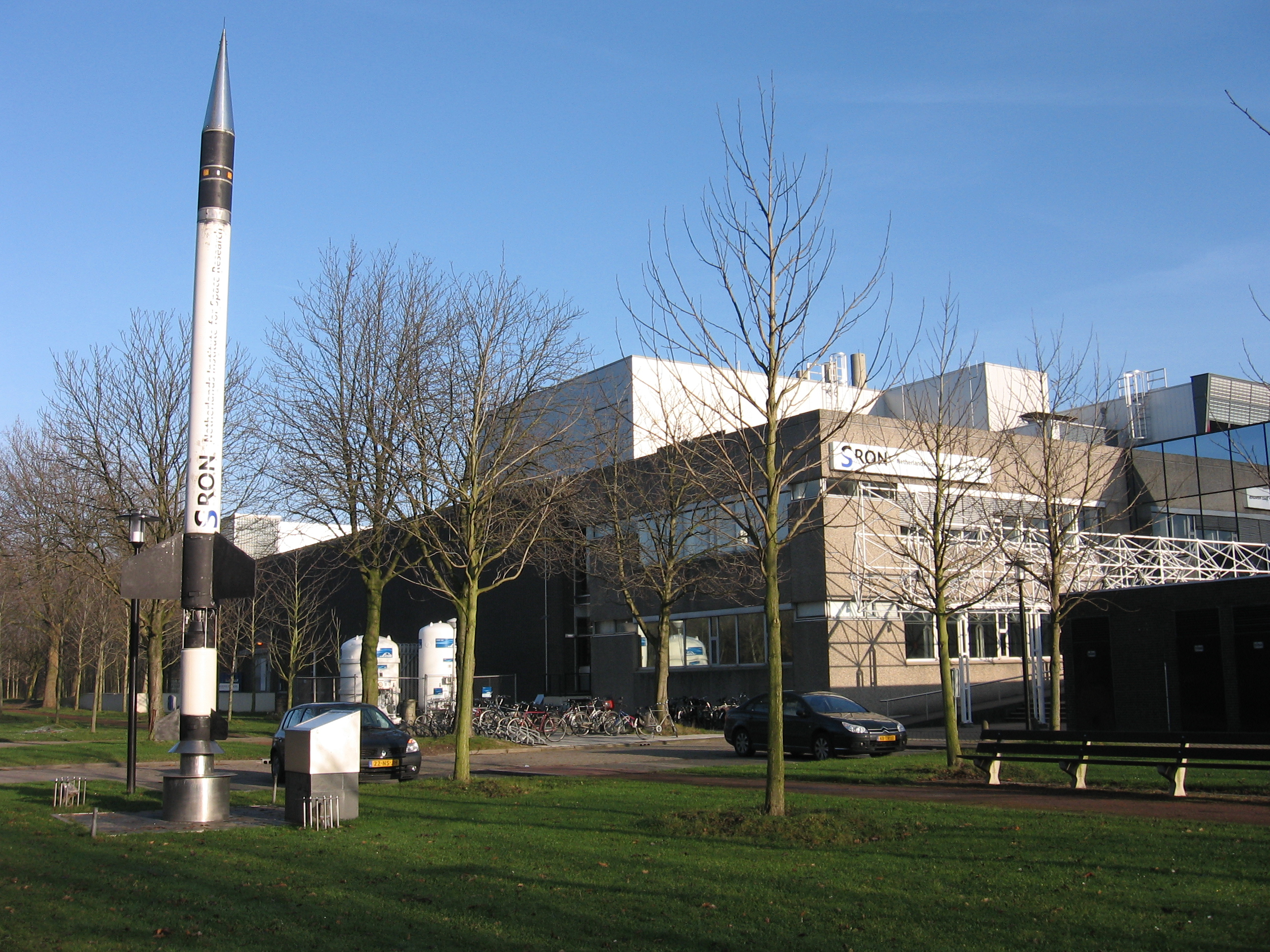 Stichting Ruimte Onderzoek Nederland, Utrecht